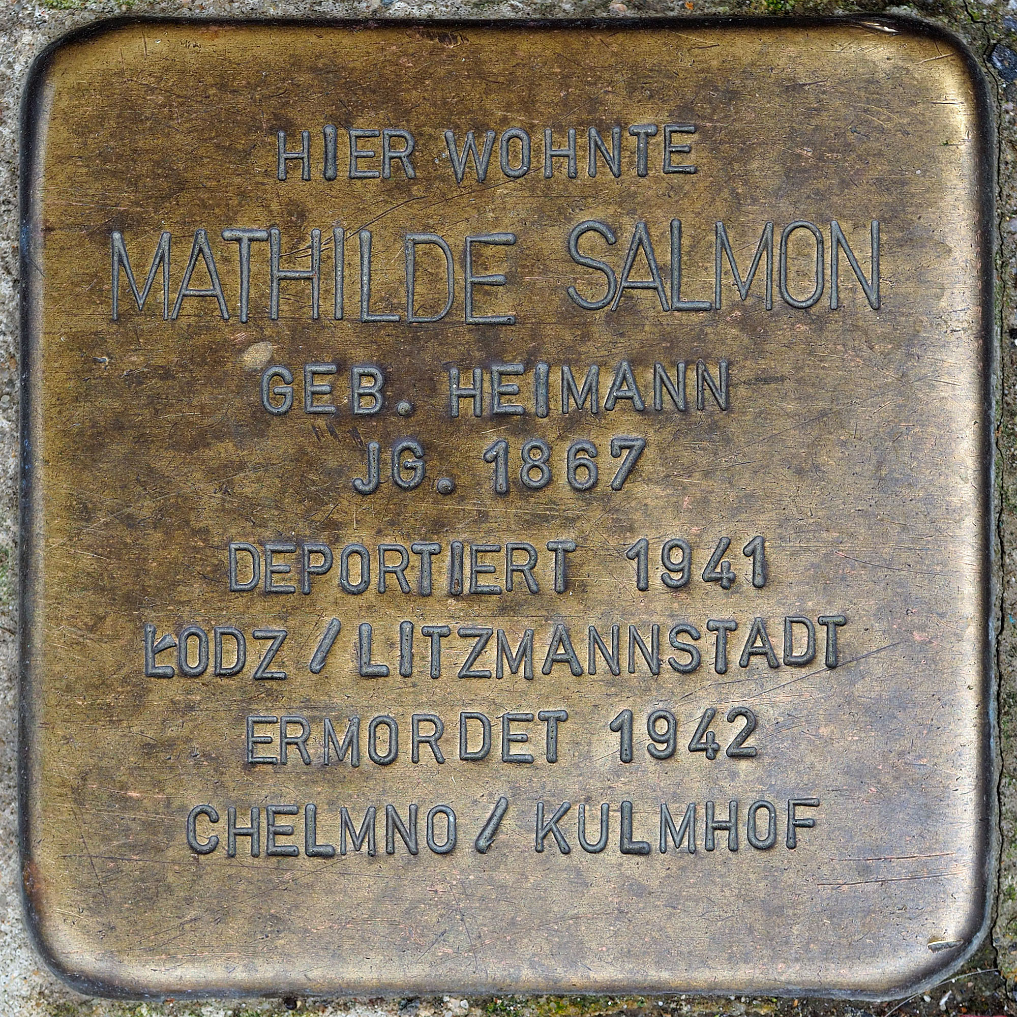 Stolpersteine MG: Salmon, Mathilde